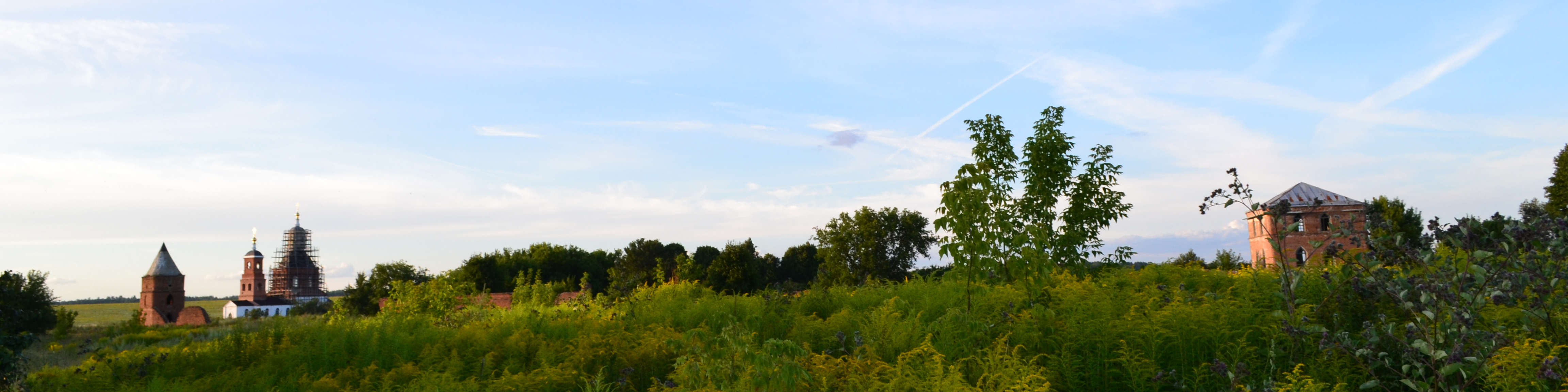 Обзорный вид на Сабуровскую крепость и церковь Михаила Архангела. Сабурово, Орловская область.